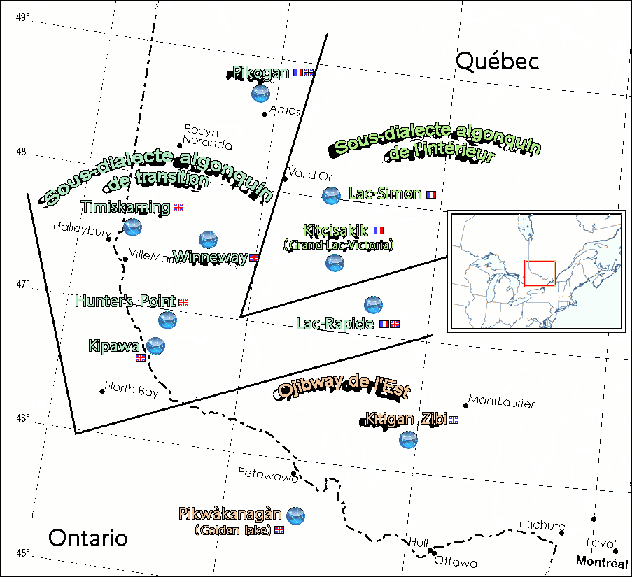 Dialectes et sous-dialectes dans les 10 réserves ou établissements algonquins D'une part, du point de vue dialectal, on vient de voir que l'algonquin se divise en deux groupes, soit le groupe algonquin tel quel et le dialecte de Maniwaki et de Golden Lake à ranger plutôt du côté de l'ojibwé de l'Est. Les vrais dialectes de l'algonquin se répartissent en deux sous-groupes : le sous-dialecte algonquin de l'intérieur regroupant Lac-Simon et Grand-Lac-Victoria, et un sous-dialecte dit de transition incluant Pikogan (Amos), Winneway, Kipawa, Témiscamingue (Notre-Dame-du-Nord) et Lac-Rapide (Rhodes et Todd, 1981). Par ailleurs, les Algonquins sont divisés quant à leur emploi des langues euro-canadiennes. Si l'anglais domine dans cinq villages (Kipawa, Winneway, Témiscamingue, Hunters Point et Maniwaki), les Algonquins du Grand-Lac-Victoria et de Lac-Simon utilisent le français comme langue seconde, alors que ceux de Pikogan et de Lac-Rapide se partagent entre le français et l'anglais (voir, dans cet ouvrage, chap. II).